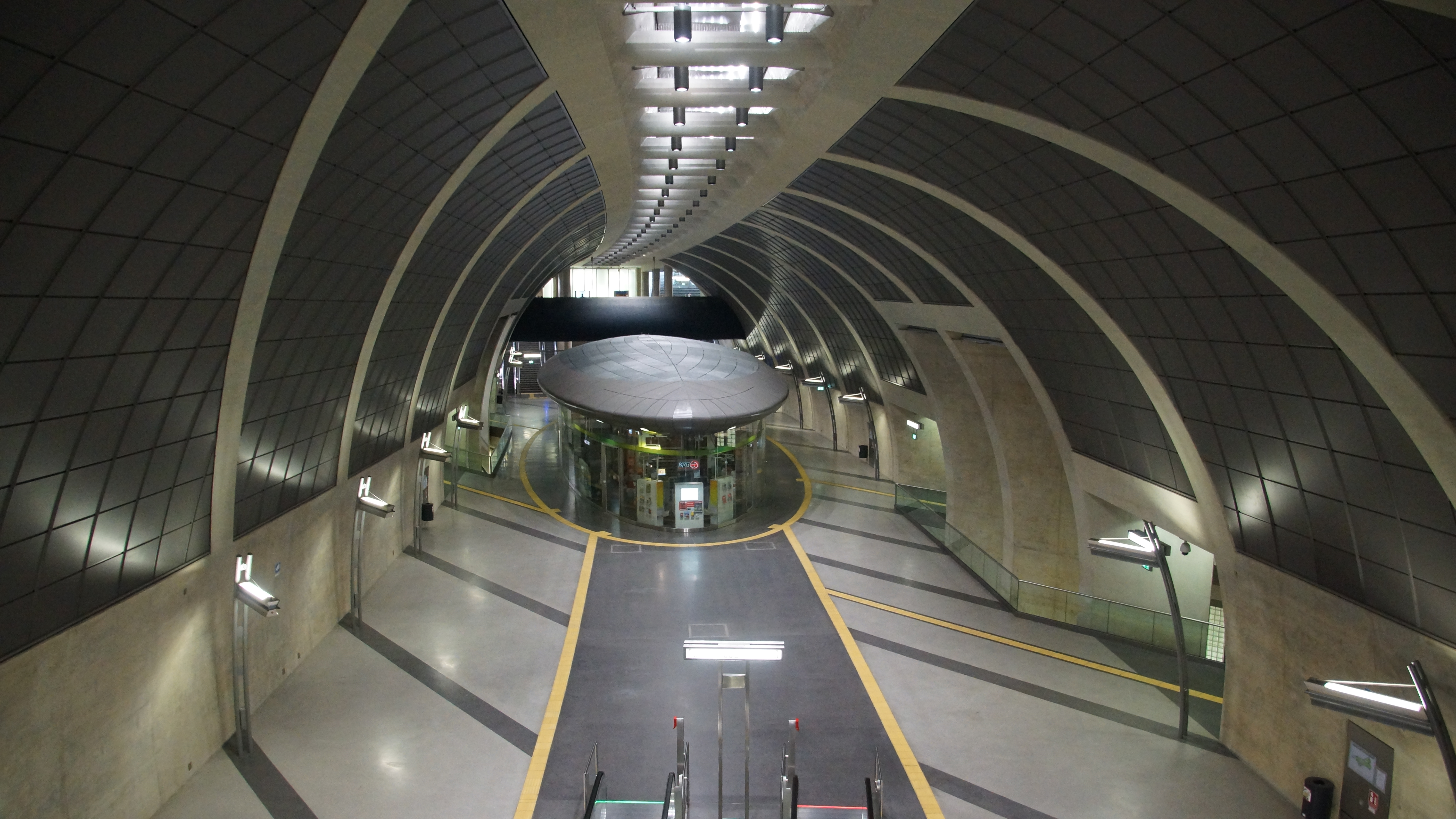 unterirdische Stadtbahnhaltestelle Heumarkt der Nord-Süd-Stadtbahn, Zwischenebene